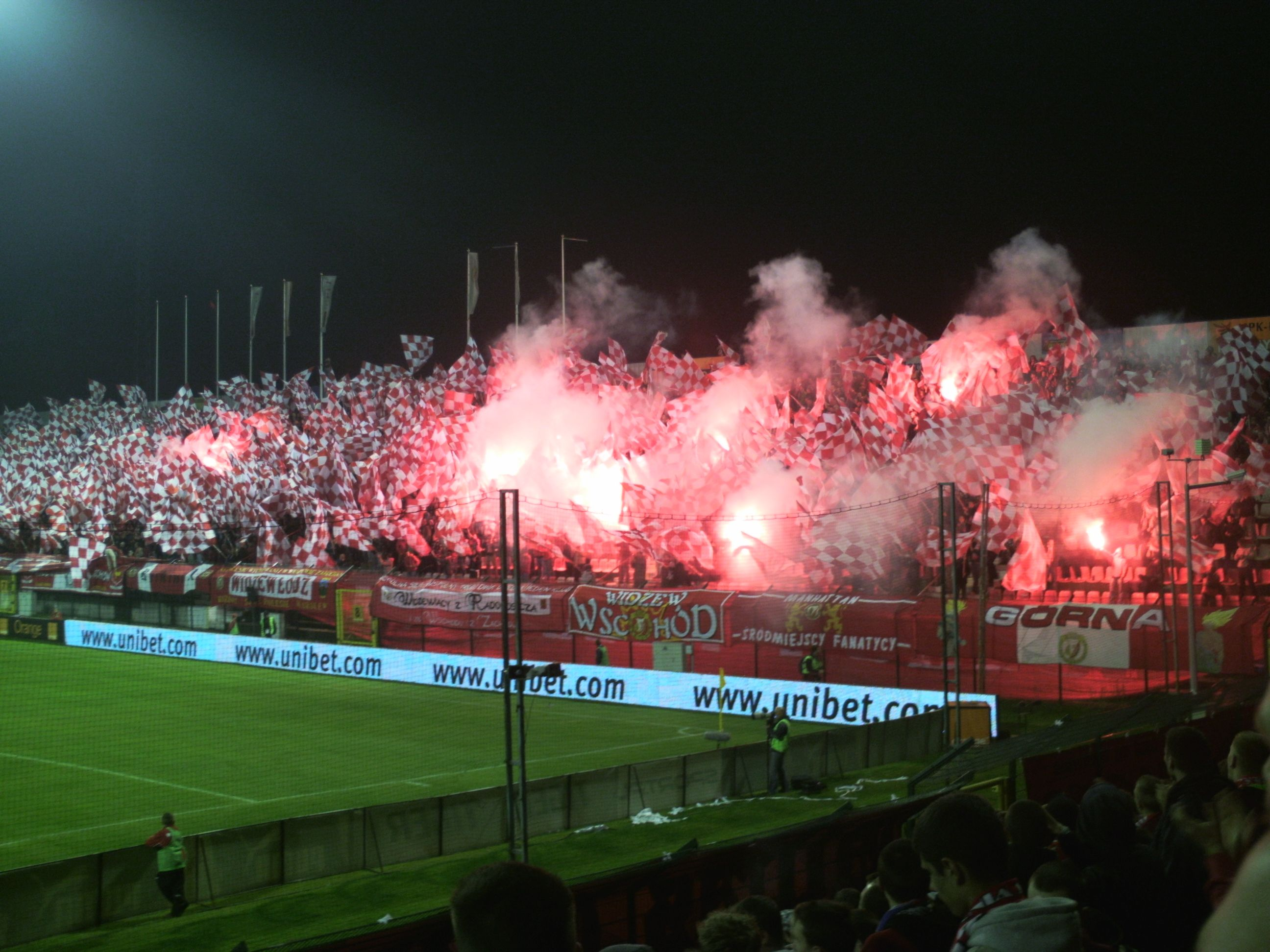 Flagowisko na 57 derbach Łodzi. Widok na trybunę C stadionu Widzewa Łódź